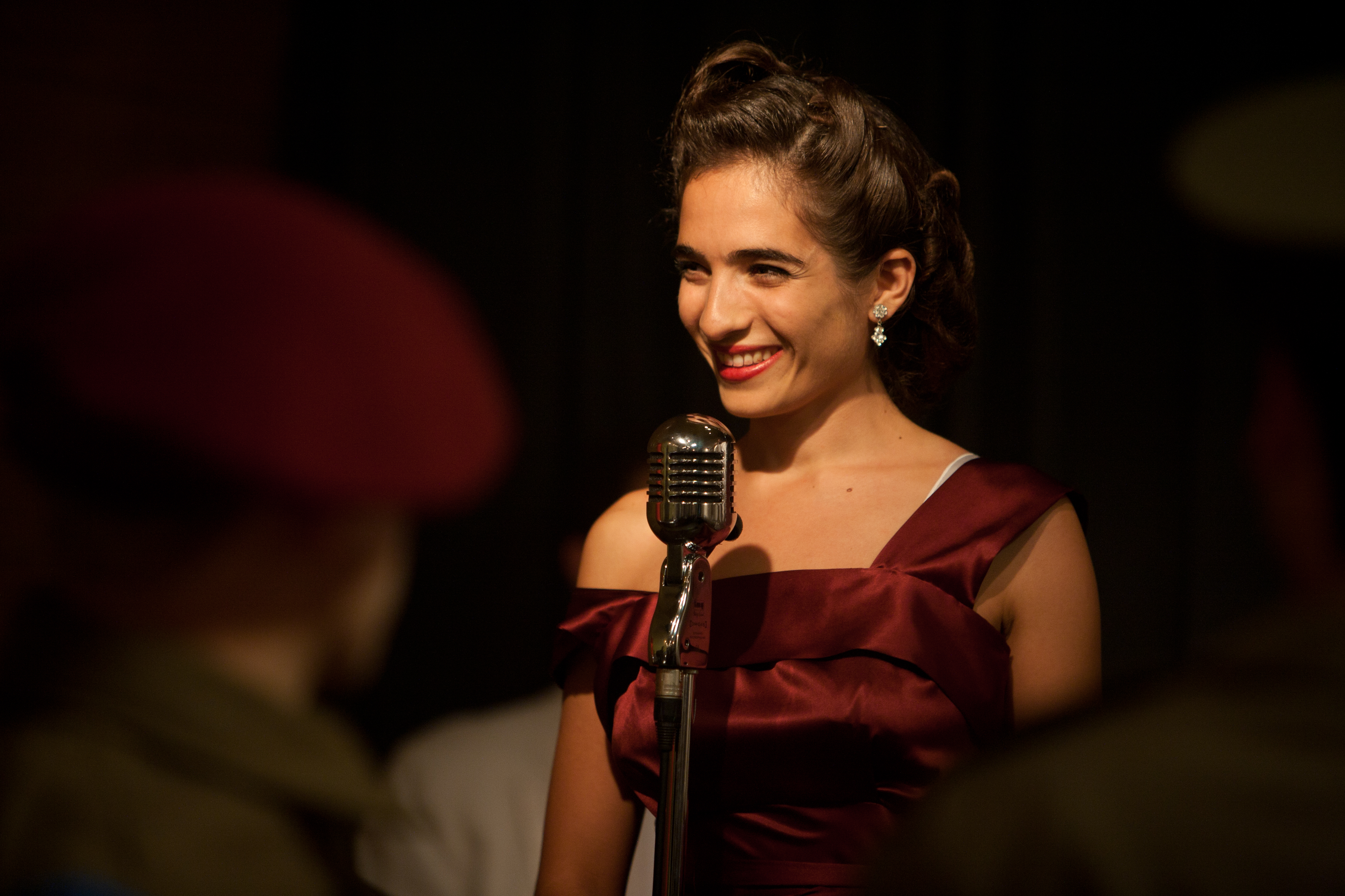 רותם זיסמן כהן בסרטה של דינה צבי ריקליס ברקיע החמישי